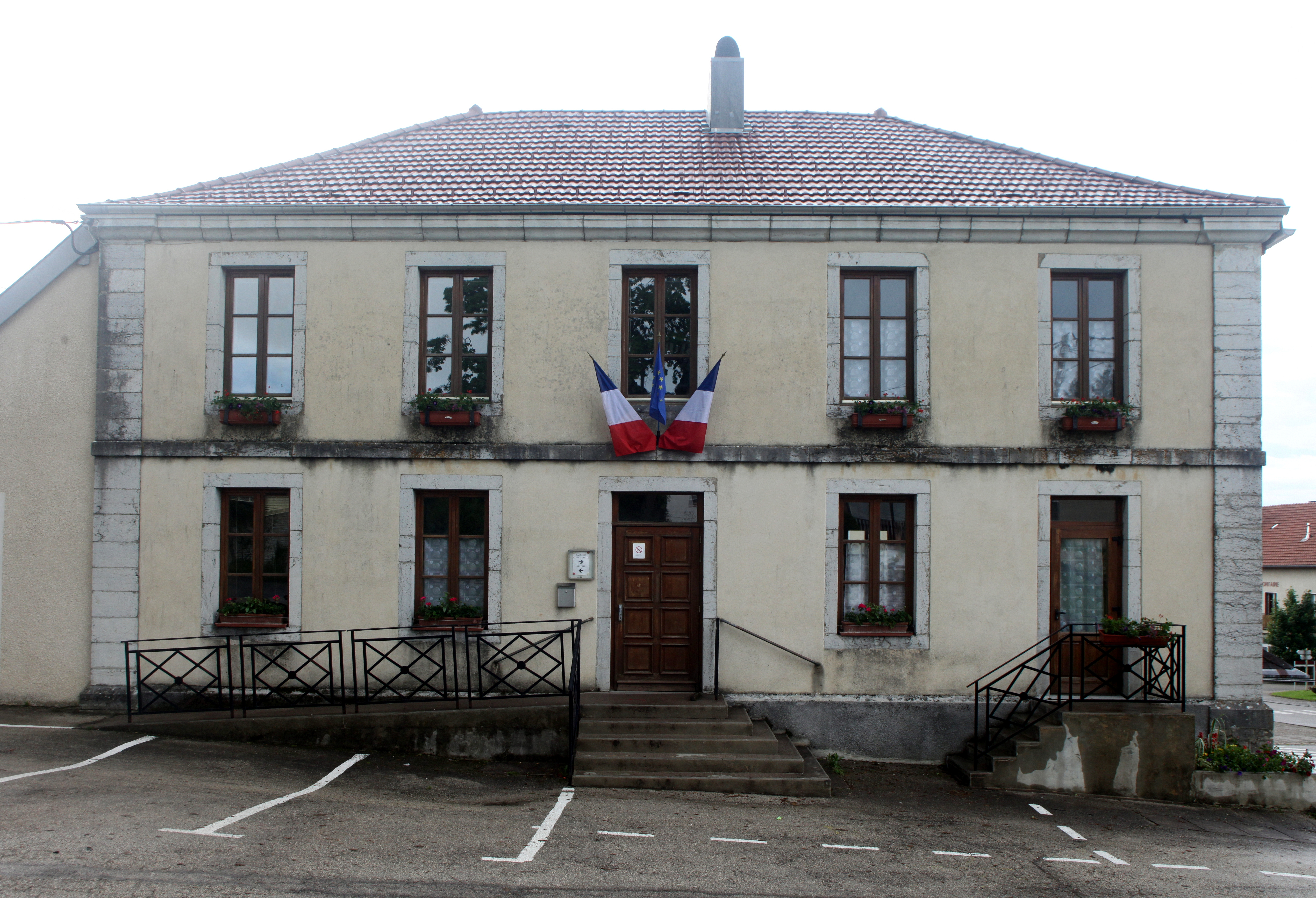 Mairie de Vernierfontaine (Doubs).